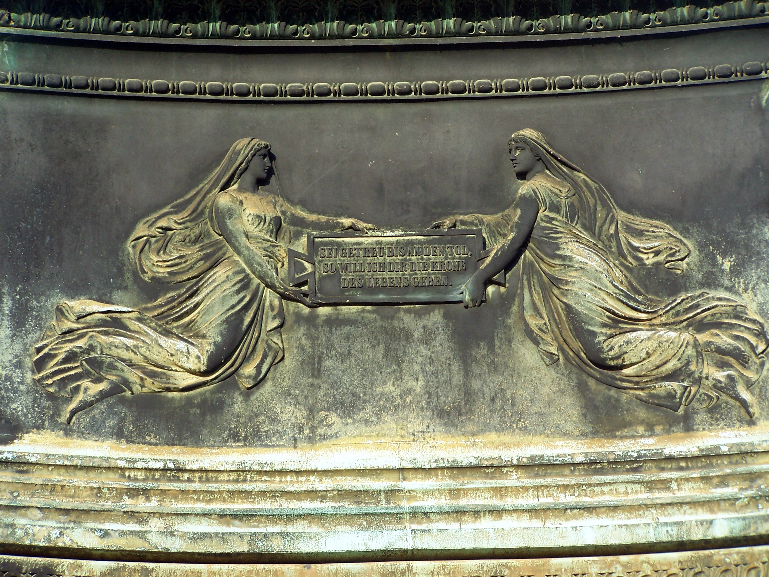 Dresden, Reiterstandbild König Johann auf dem Theaterplatz